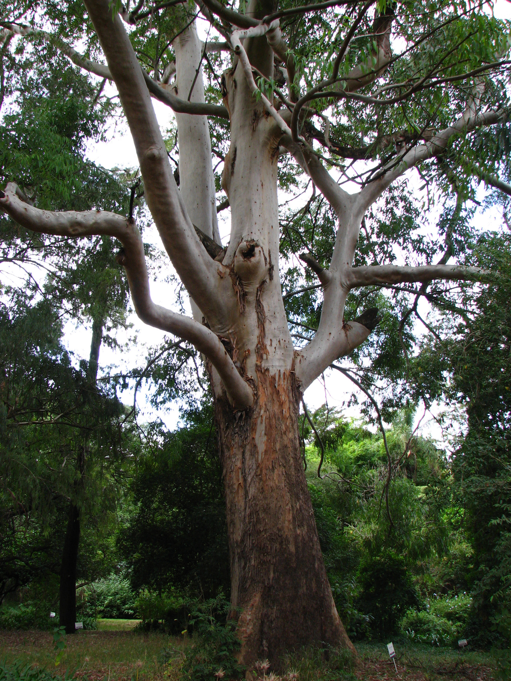 Ejemplar de Eucalyptus saligna, en el Jardín Botánico "C. Spegazzini" de la ciudad de La Plata, Argentina.